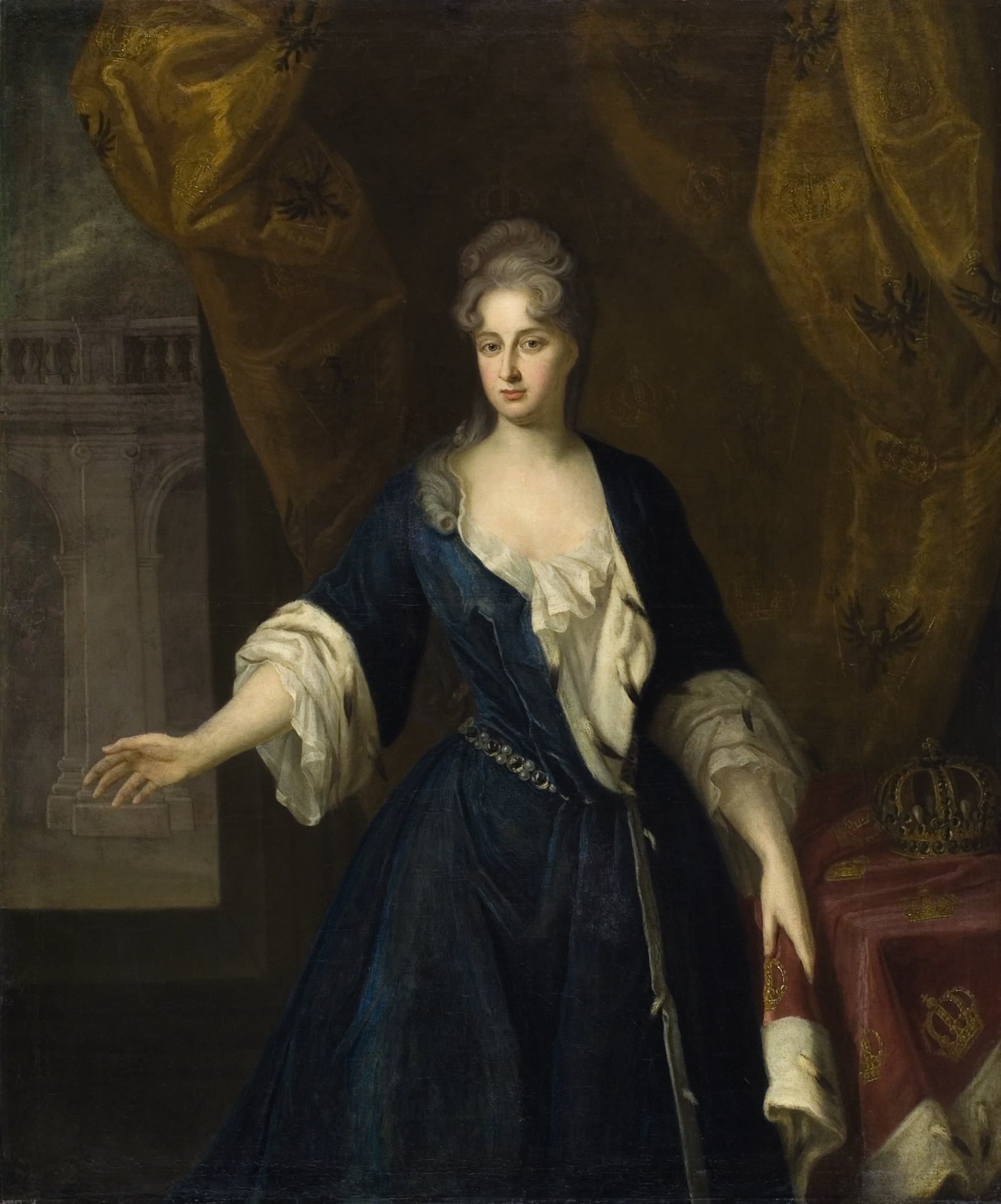 Sophie Luise von Mecklenburg-Schwerin (1685-1735), Königin von Preußen.